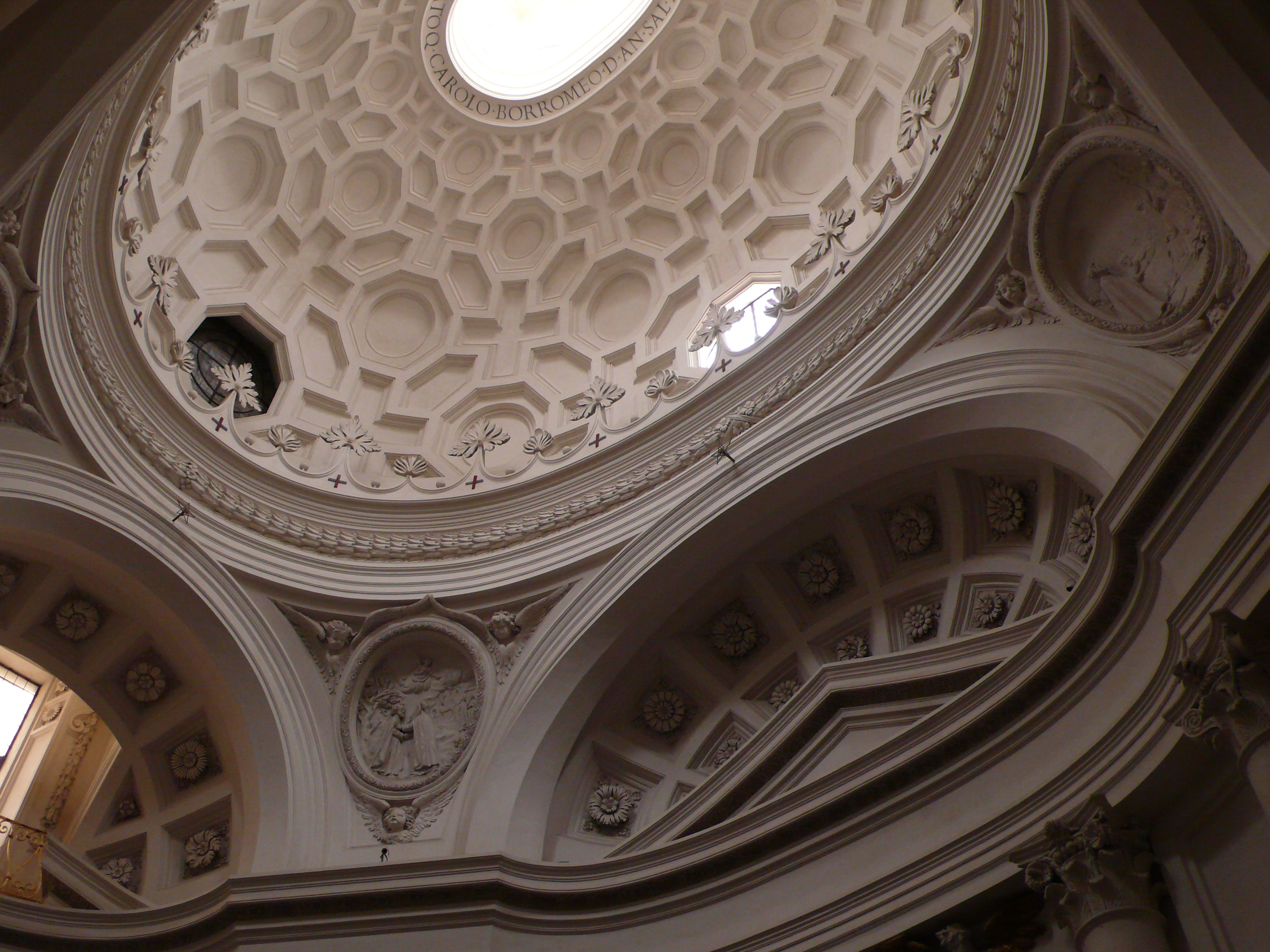 San Carlo alle Quattro Fontane (Rome), Borromini